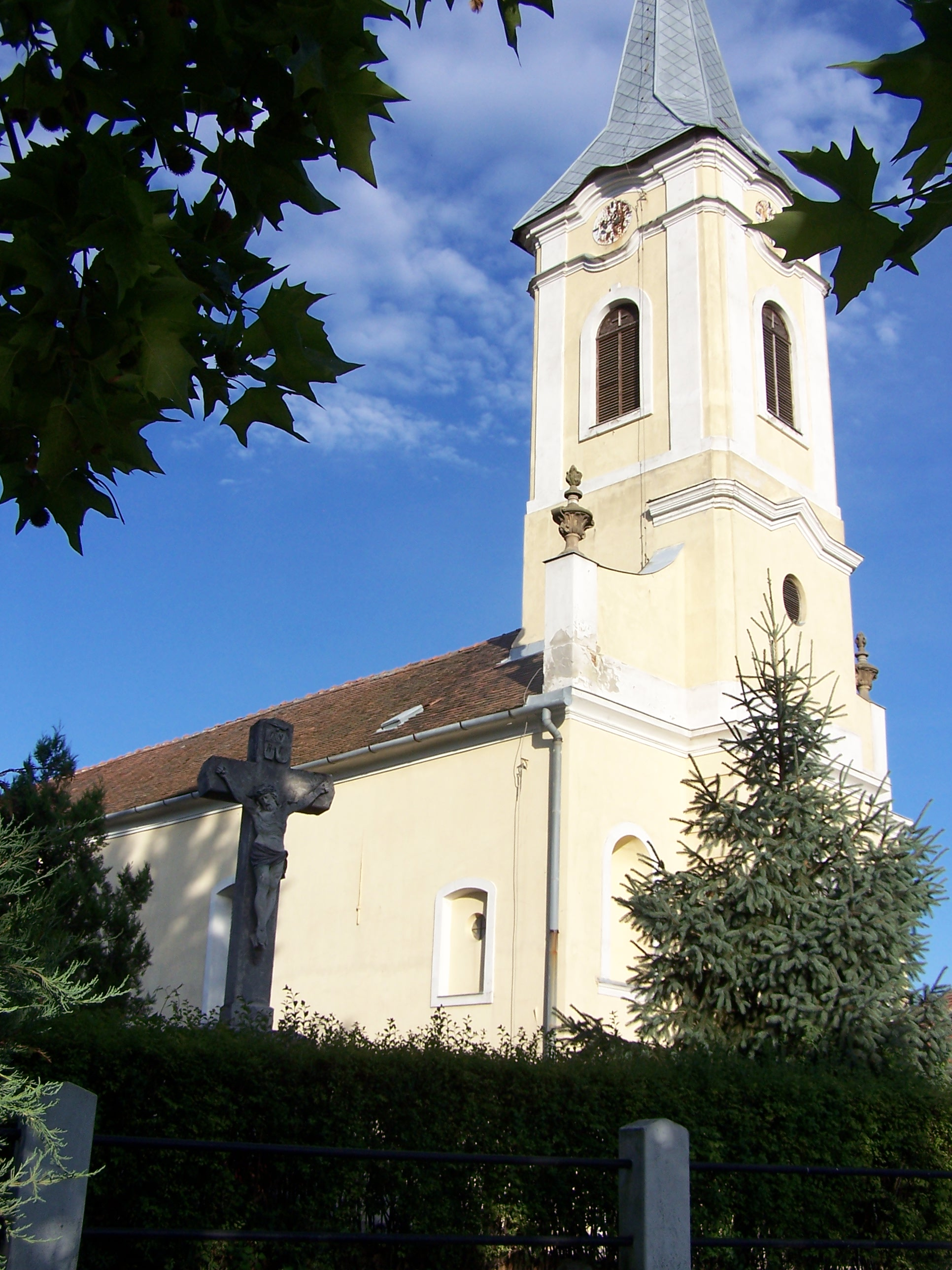 Szent Miklós római katolikus templom (Verseg, Fő u. 1.) This is a photo of a monument in Hungary, Identifier: 7584